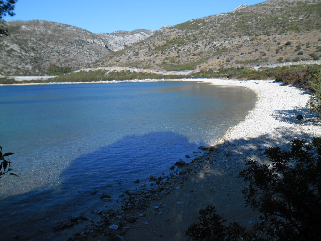 plaža Budima, Banići